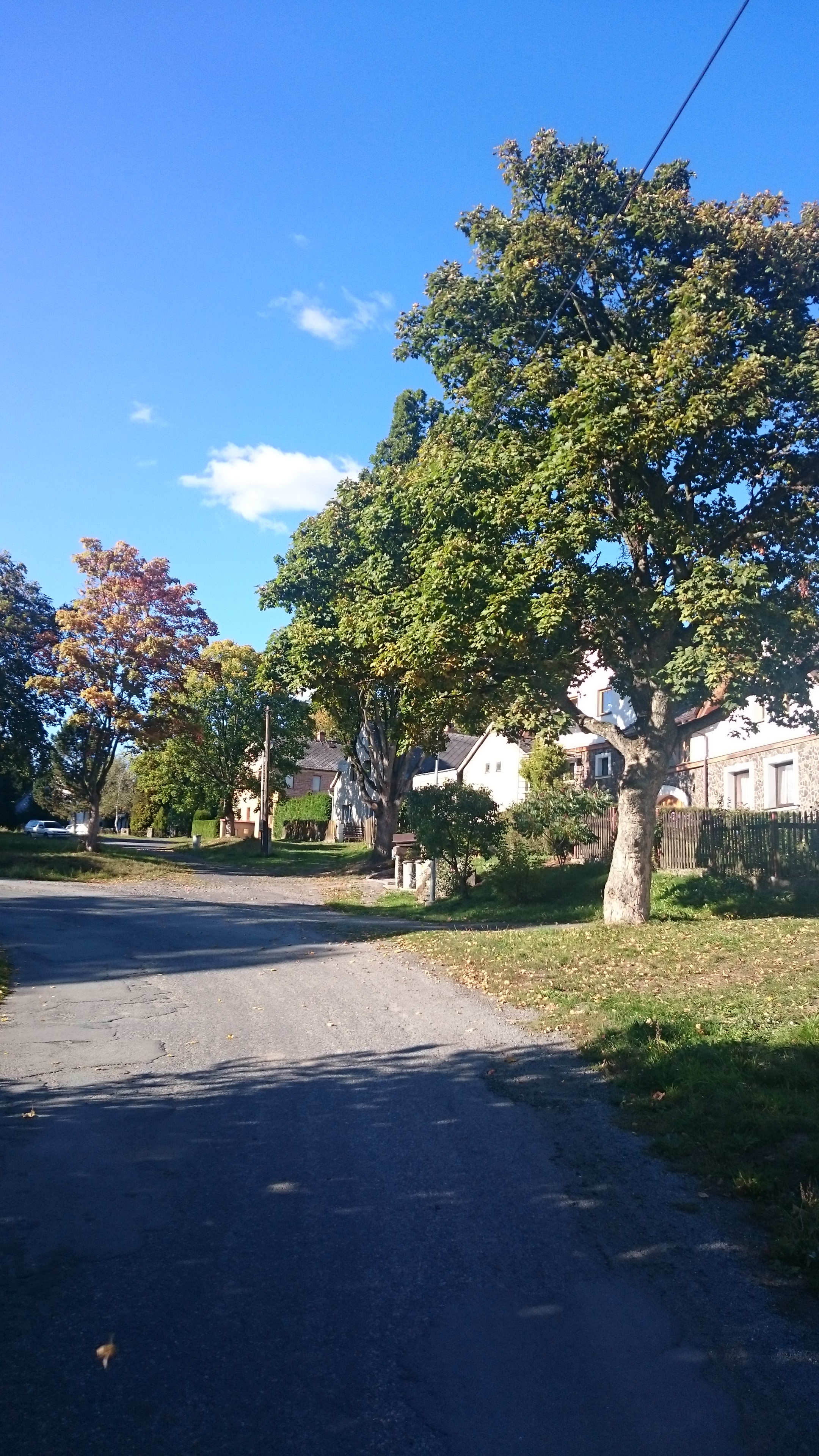 Náves v Čestětíně. Okres Plzeň-sever, Česká republika.